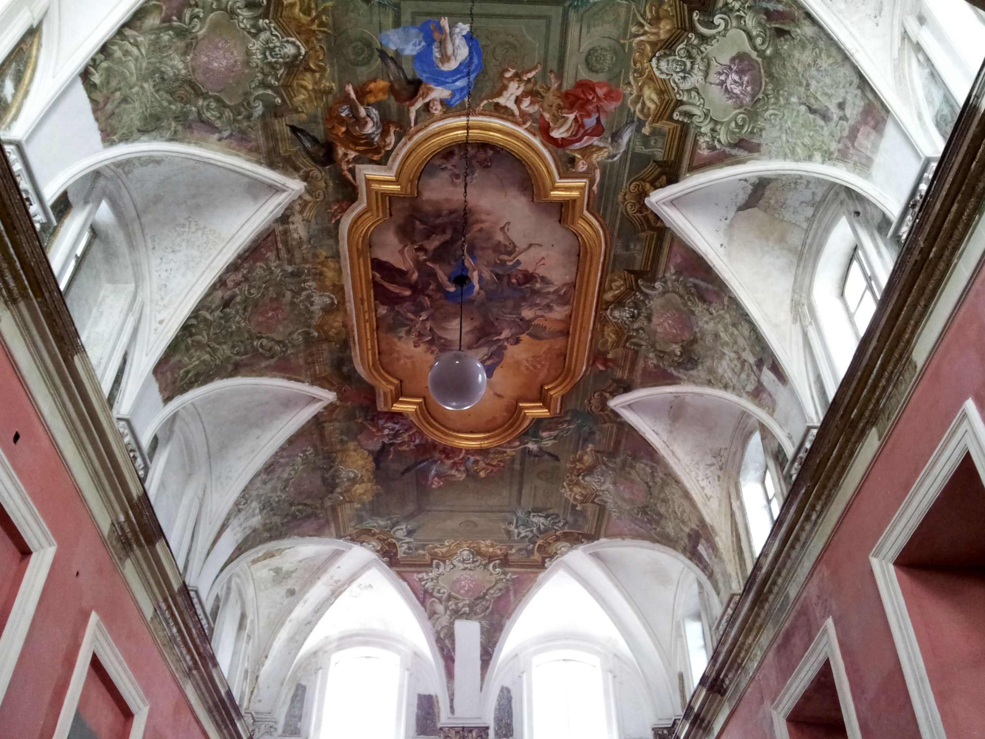 Chiesa dei Girolamini (Napoli) - Il soffitto con l'affreso di Giovan Battista Beinaschi raffigurante San Filippo Neri in gloria (740×400 cm) databile al XVII secolo.